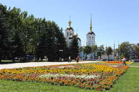 Александровский сквер на ХТЗ